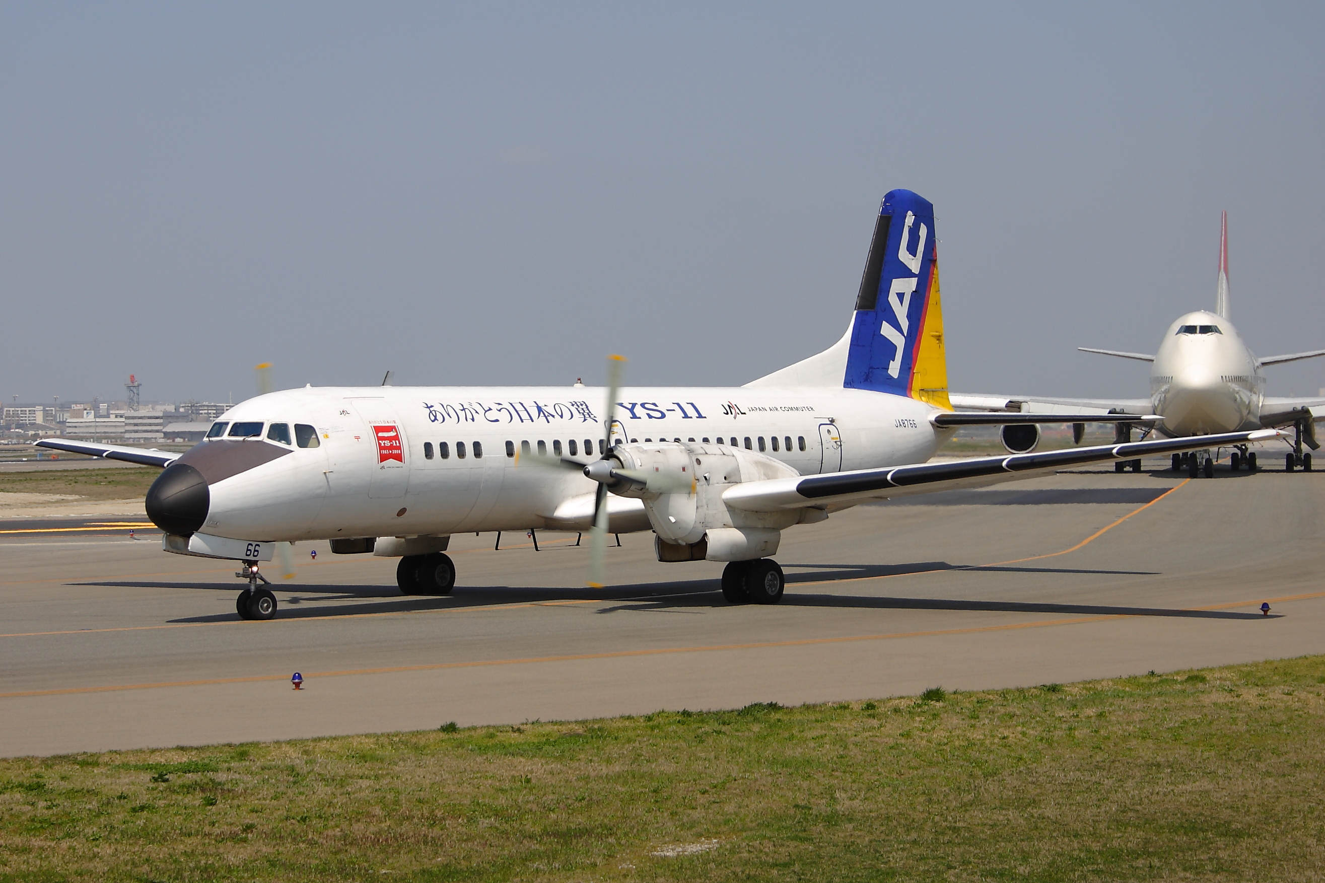 日本エアコミューター 日本航空機製造 YS-11A-500 「ありがとう日本の翼」 JA8766 福岡空港